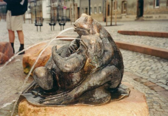 Froschbrunnen auf dem Harthaer Markt